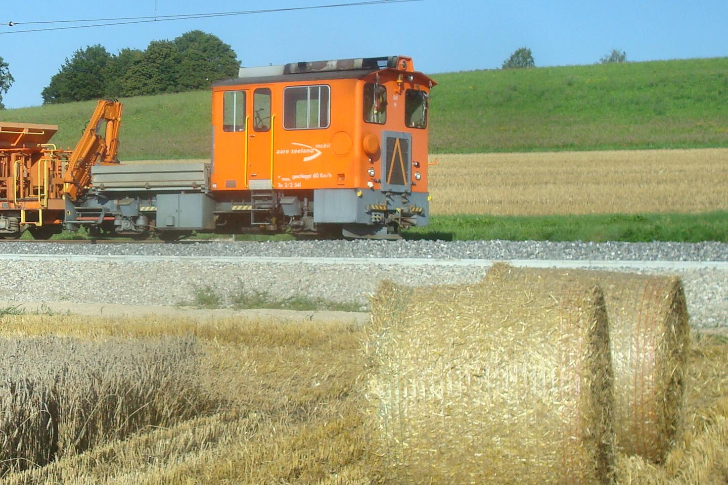 Bahndienstfahrzeug Tm 2/2 541 der Aare Seeland mobil (ASm) in Siselen-Finsterhennen im Sommer 2010.